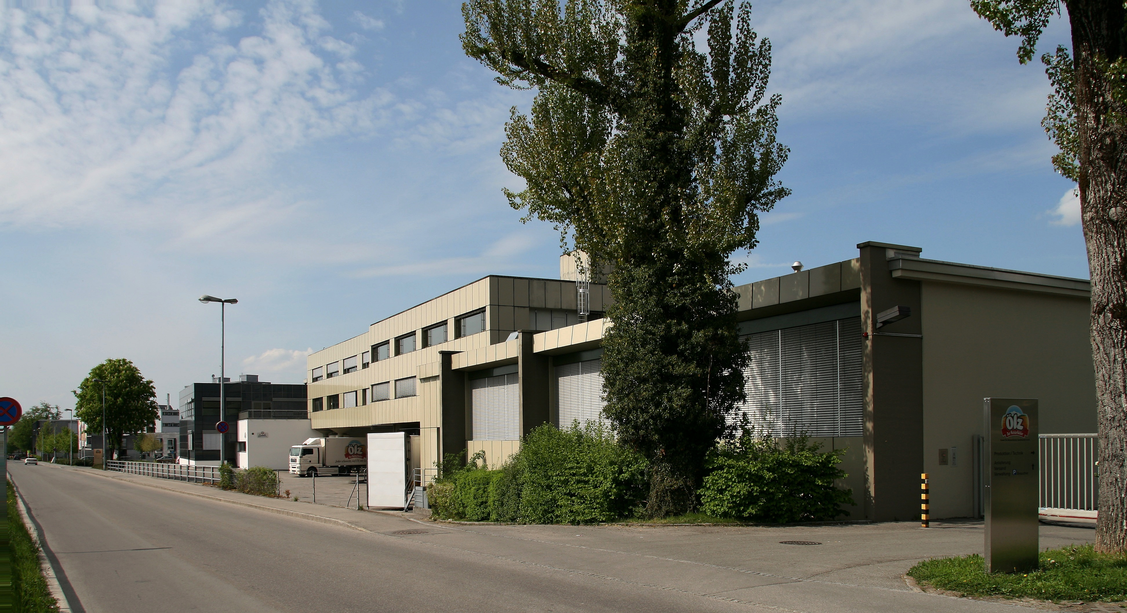 Die Rudolf Ölz Meisterbäcker GmbH ist ein österreichischer Backwarenhersteller. Ihren Hauptsitz hat die Gesellschaft in Dornbirn im Bundesland Vorarlberg, wo sie der zweitgrößte Arbeitgeber der Stadt ist. Nach eigenen Angaben ist Ölz Marktführer bei Backwaren in Österreich. Besonders bekannt wurde das Unternehmen im Jahr 1953 mit der Erfindung der Backerbsen sowie deren erstmaligem Verkauf.*** Hier das Werk Juchen an der Achstrasse in Dornbirn.